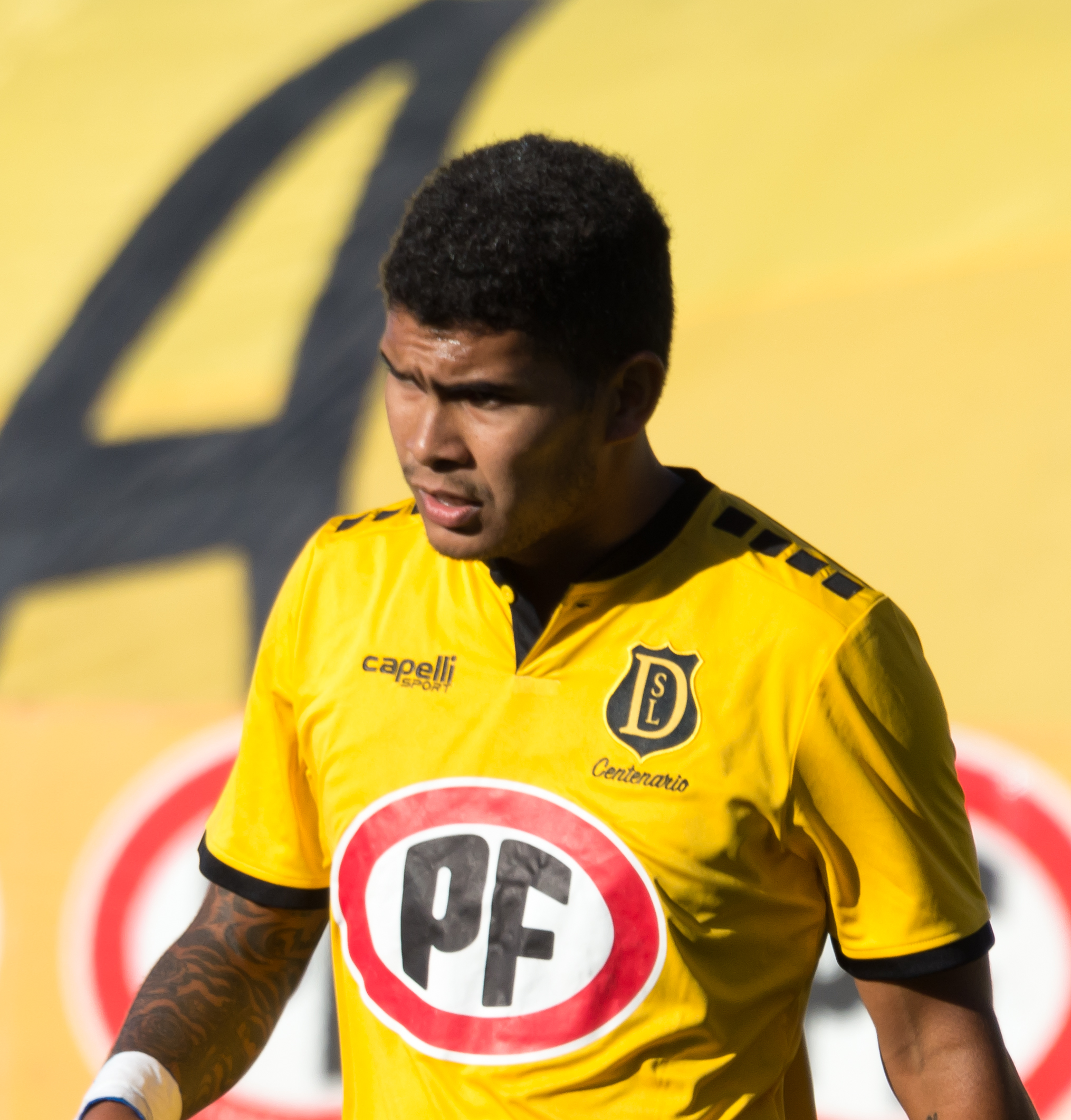 Osmar Leguizamón, San Luis v Santiago Wanderers, Estadio Municipal Lucio Fariña Fernández, Quillota, Región de Valparaíso, Chile.